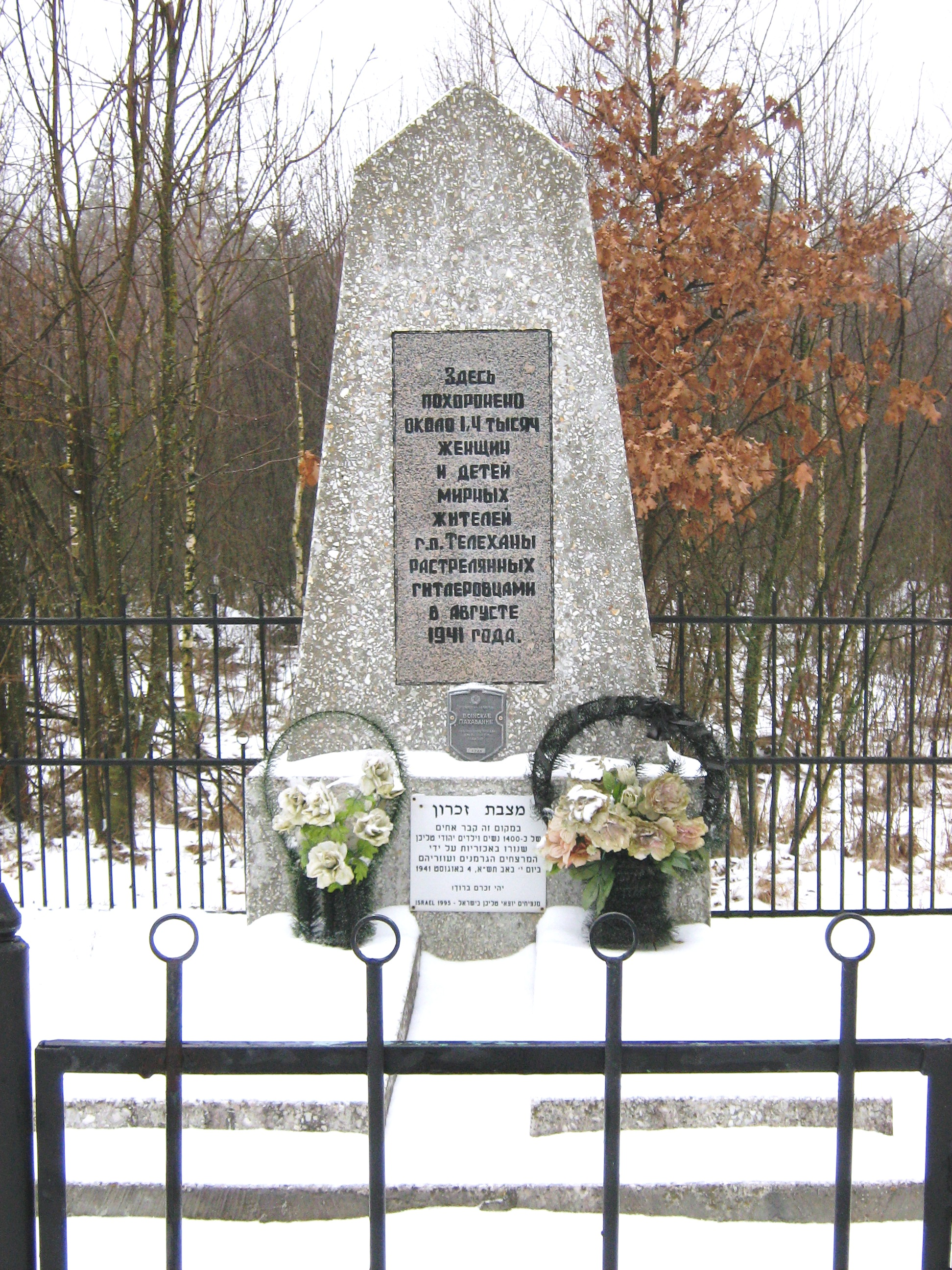 Памятник на месте убийства нацистами 1400 евреев Телехан. Находится в 300 метрах севернее дороги Телеханы-Выгонощи. Установлен в 1995 году. Учётный номер паспорта воинского захоронения: 4726